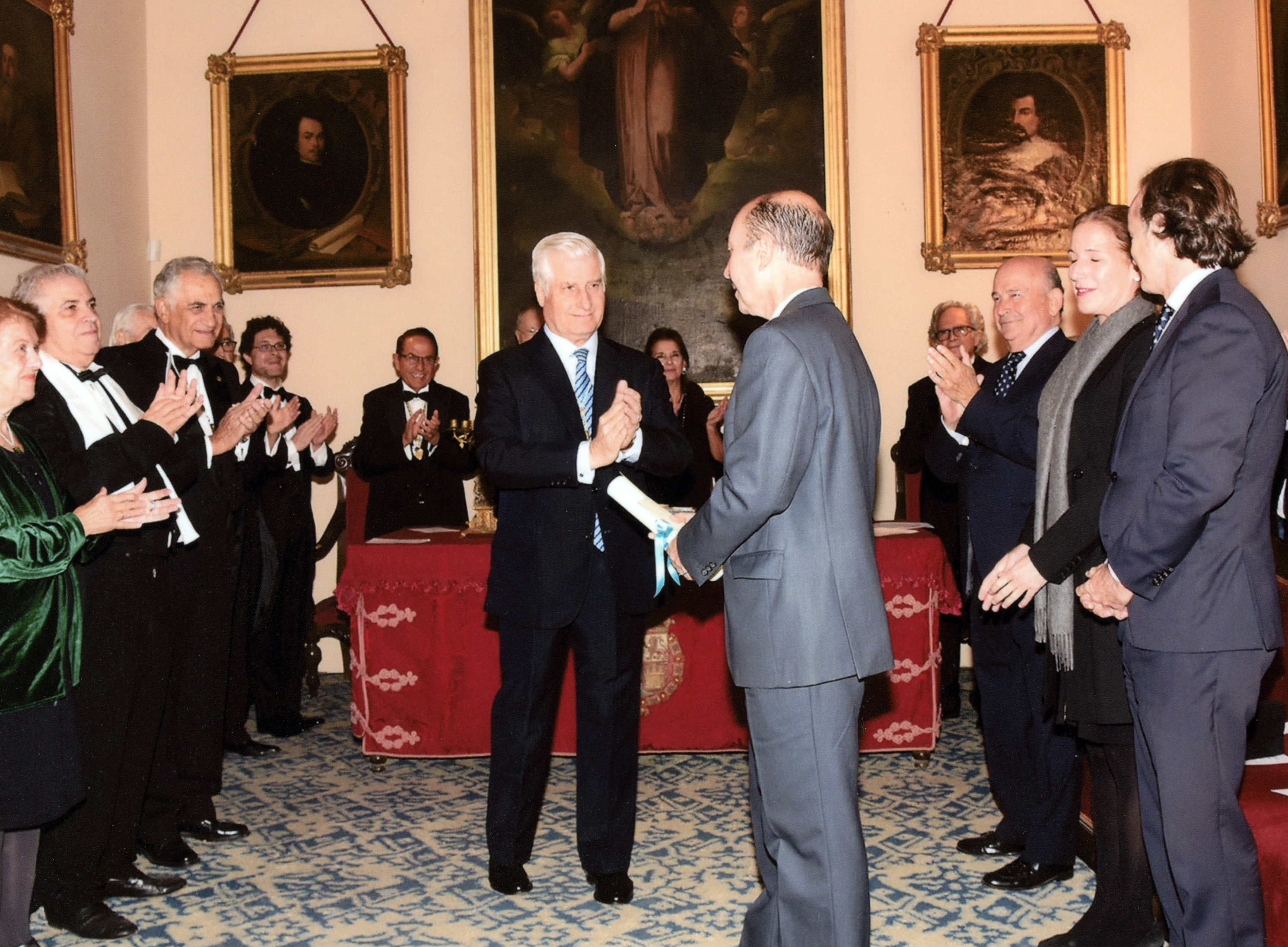 Luis Javier Gayá en la entrega del premio de pintura "Duque de Alba" en la Real Academia de Bellas Artes de Sevilla.